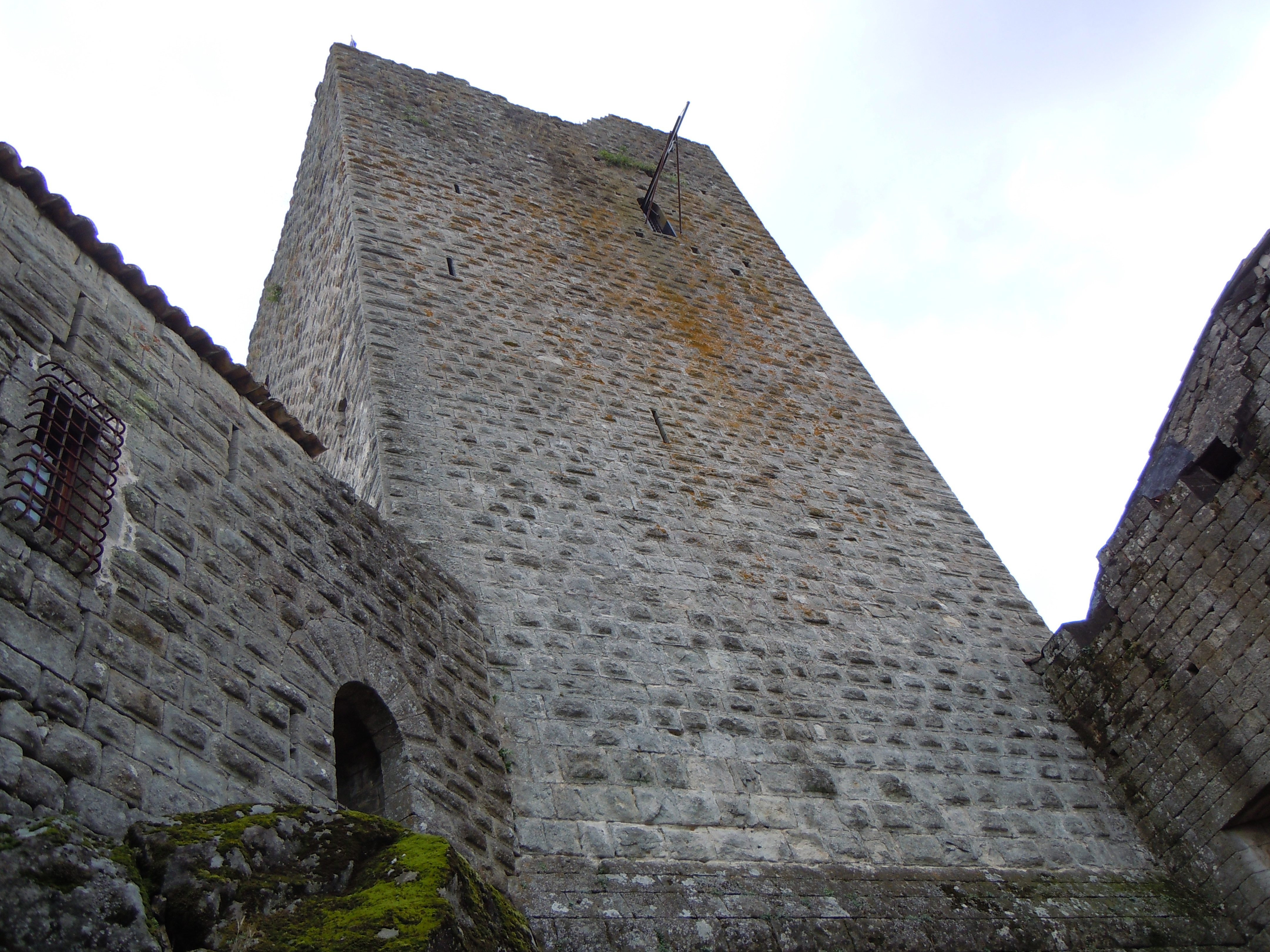 Château de Montréal (Ardèche) - Donjon